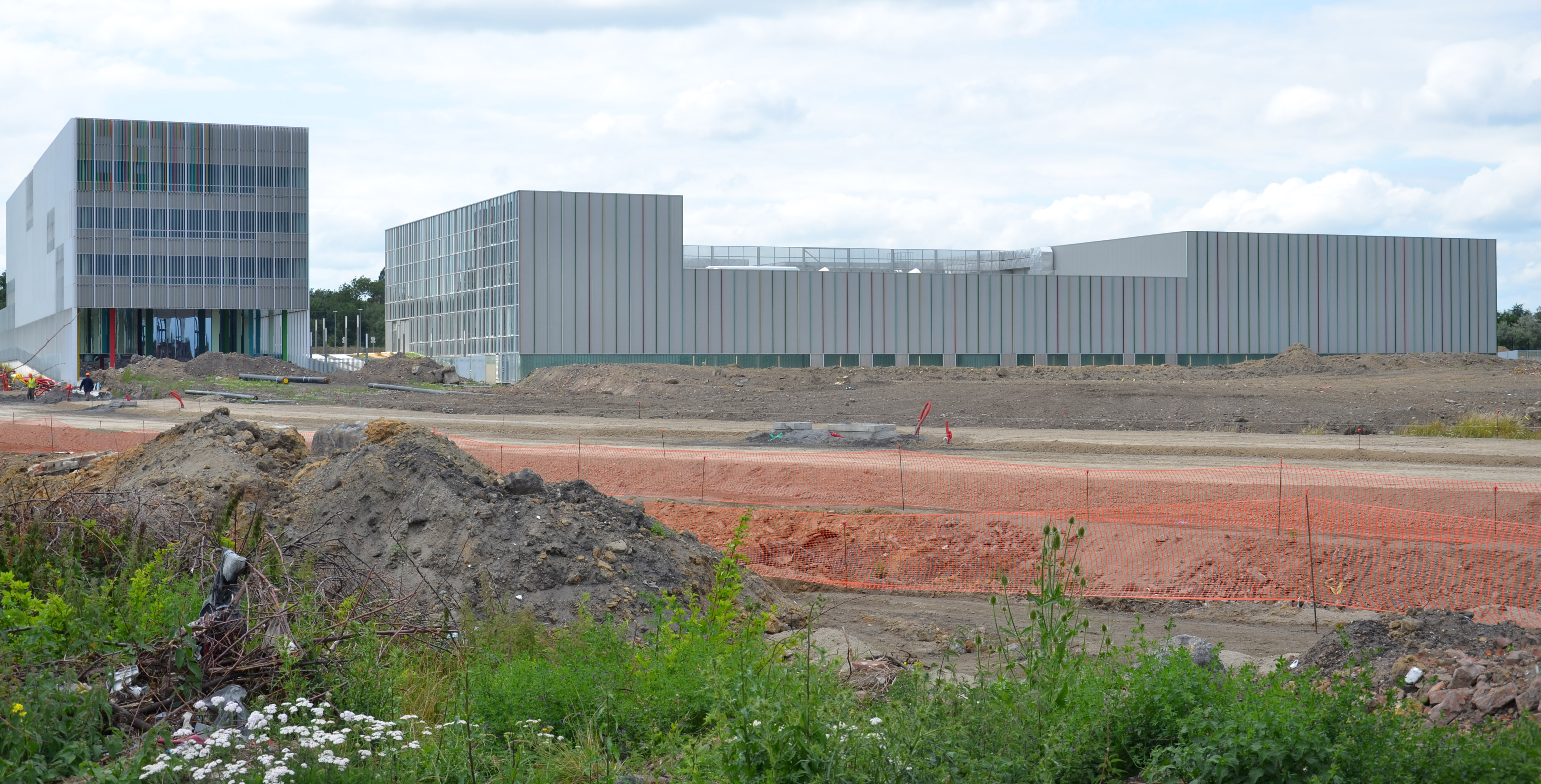 (Centre européen des textiles innovants), encore en construction en juin 2011, dans la zone de l'Union